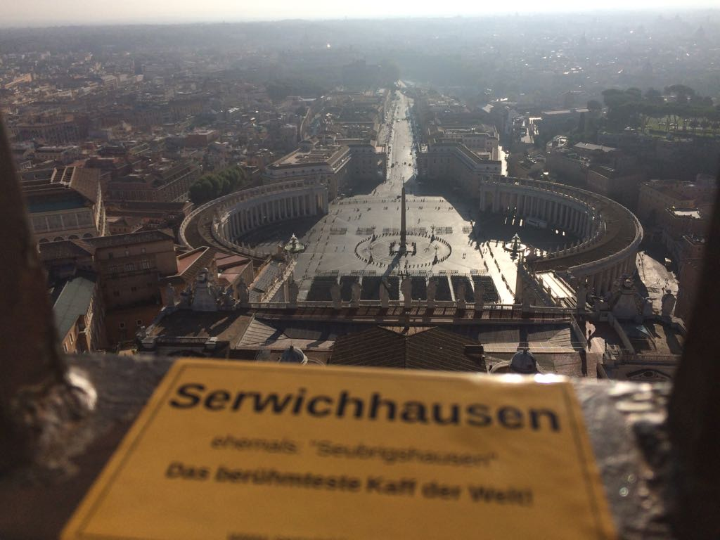 Blick von der Kuppel des Petersdoms in Rom.